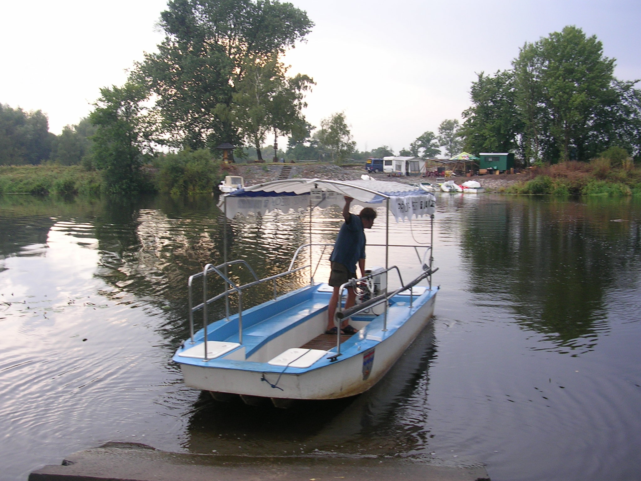 Přívoz Oseček (u Poděbrad), pohled z východního břehu